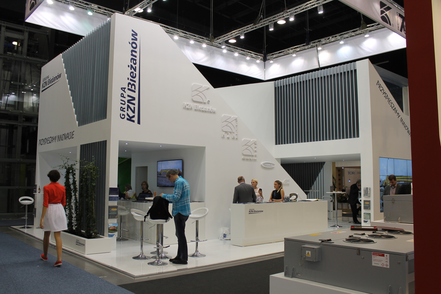 Stoisko KZN Bieżanów podczas targów Trako 2015. The making of this document was supported by Wikimedia Polska Association, within Wikigrant no. WG 2015-34. English | polski | +/−